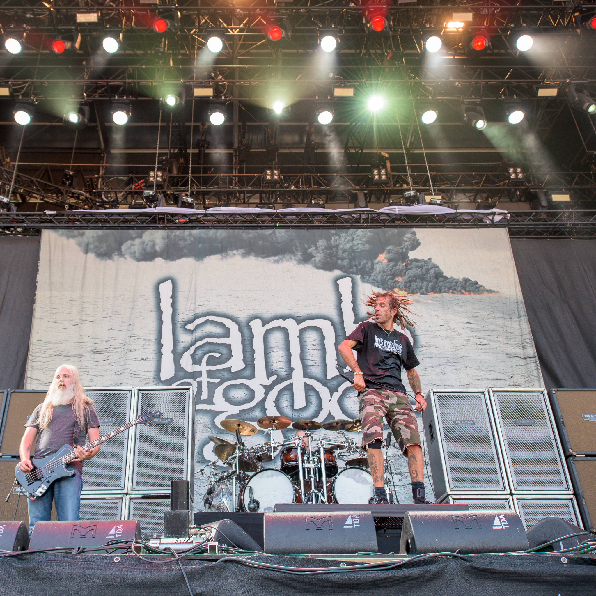 ARGO-Konzerte,Beck's Park Stage,Chris Adler,Festival,John Campbell,Konzert,Lamb of God,Livekonzert,Livemusik,Musik,Randy Blythe,RiP,Rock im Park 2015